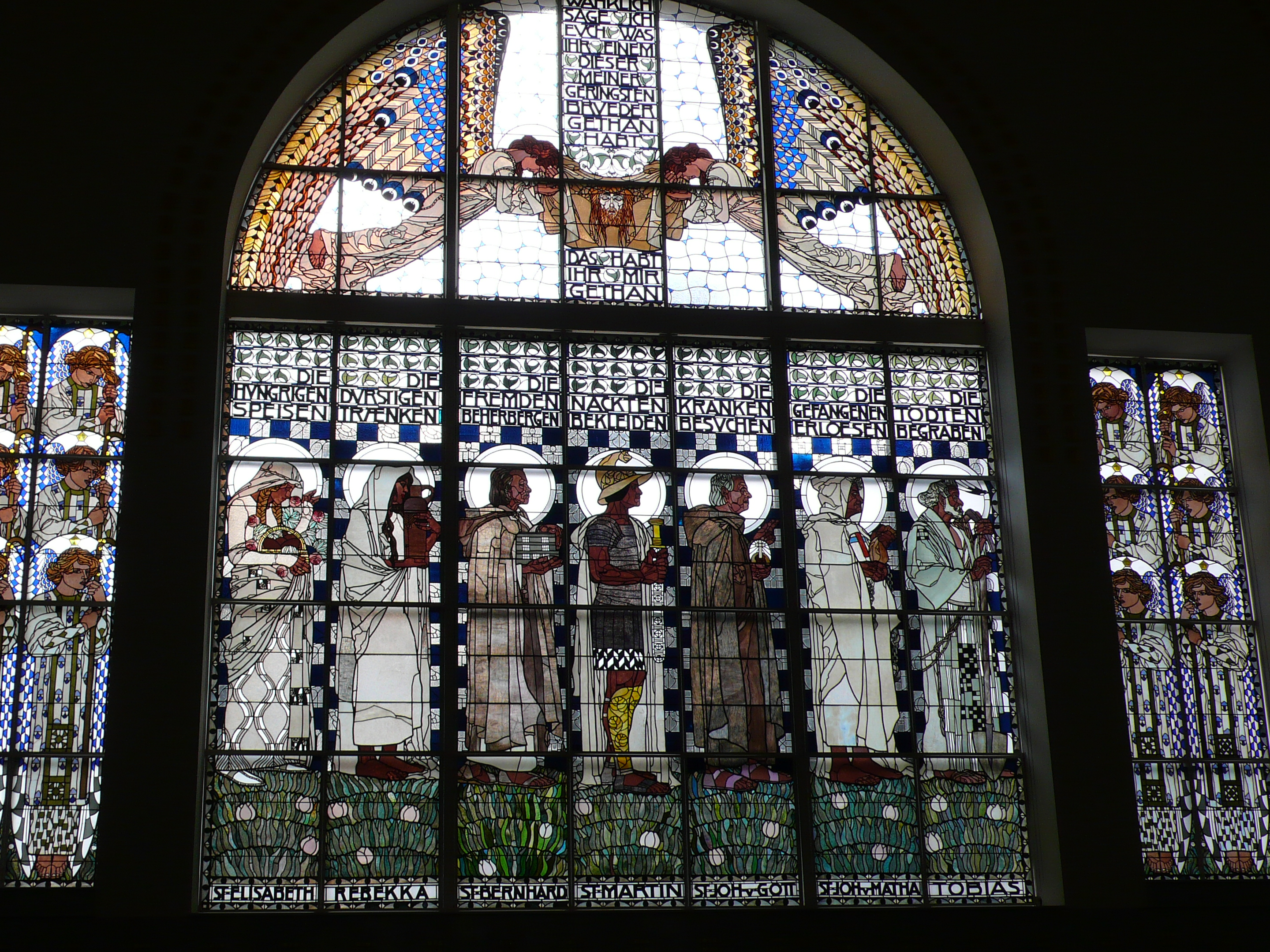 Kirche am Steinhof, Wien, Otto Wagner